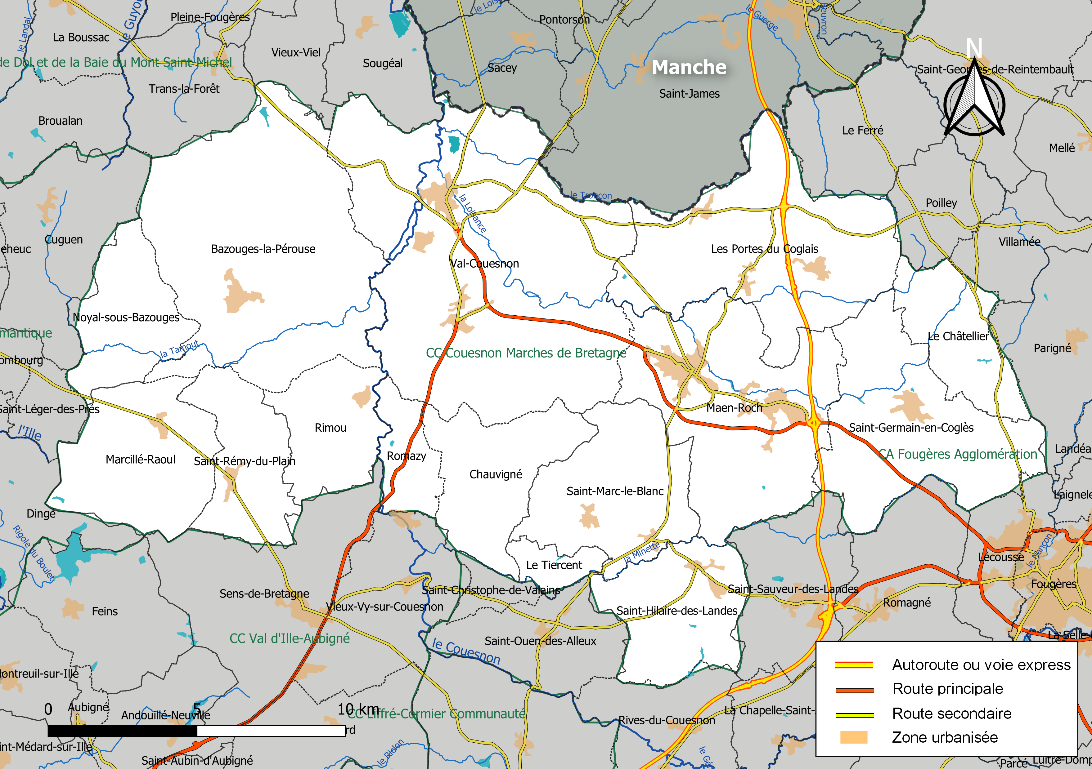 Carte géographique de la Communauté de communes Couesnon Marches de Bretagne, département d'Ille-et-Vilaine, France. Composition au 1er janvier 2019.